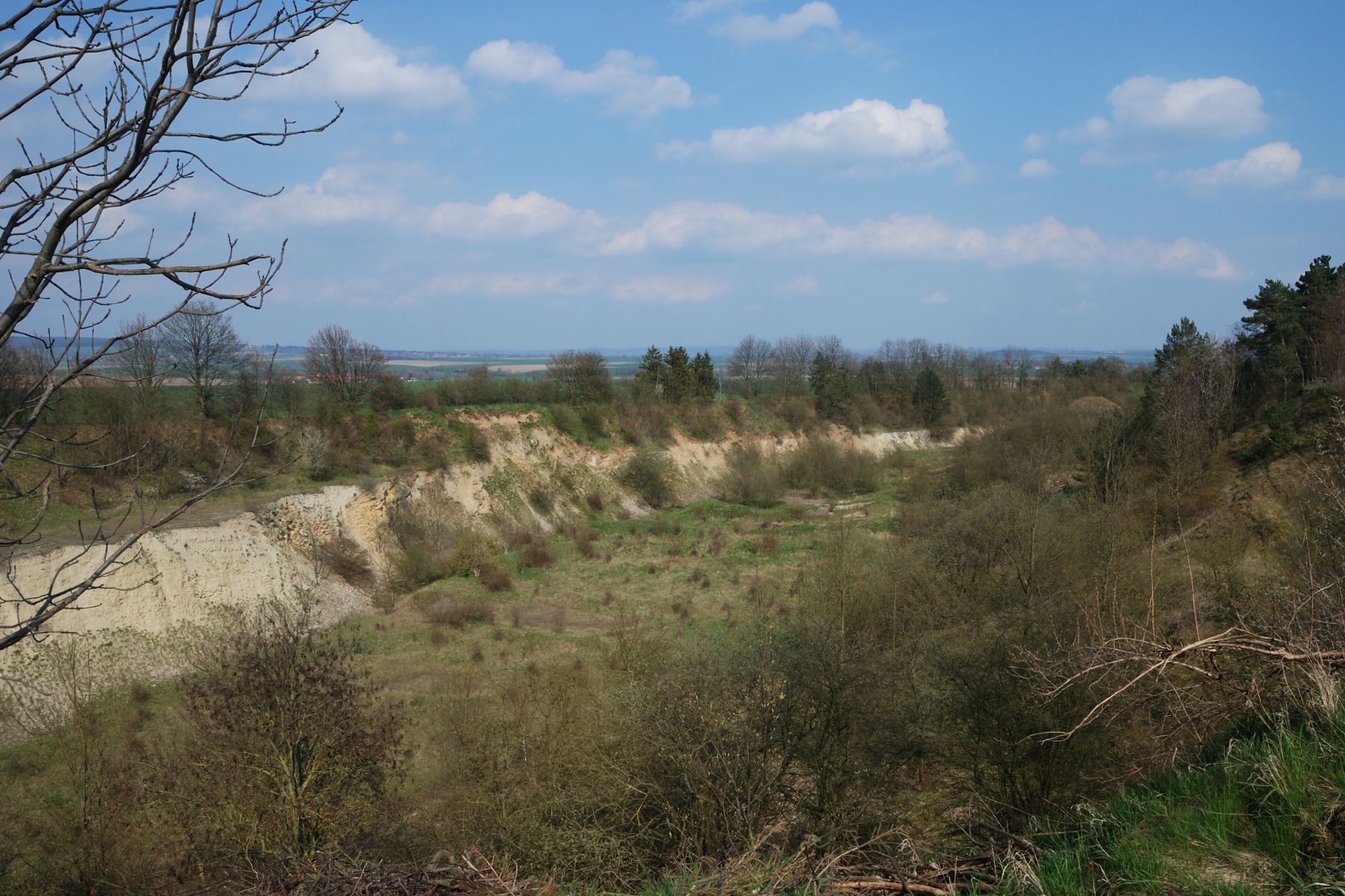 Kalksteinbruch am Lohlberg, Blick Richtung Nordost